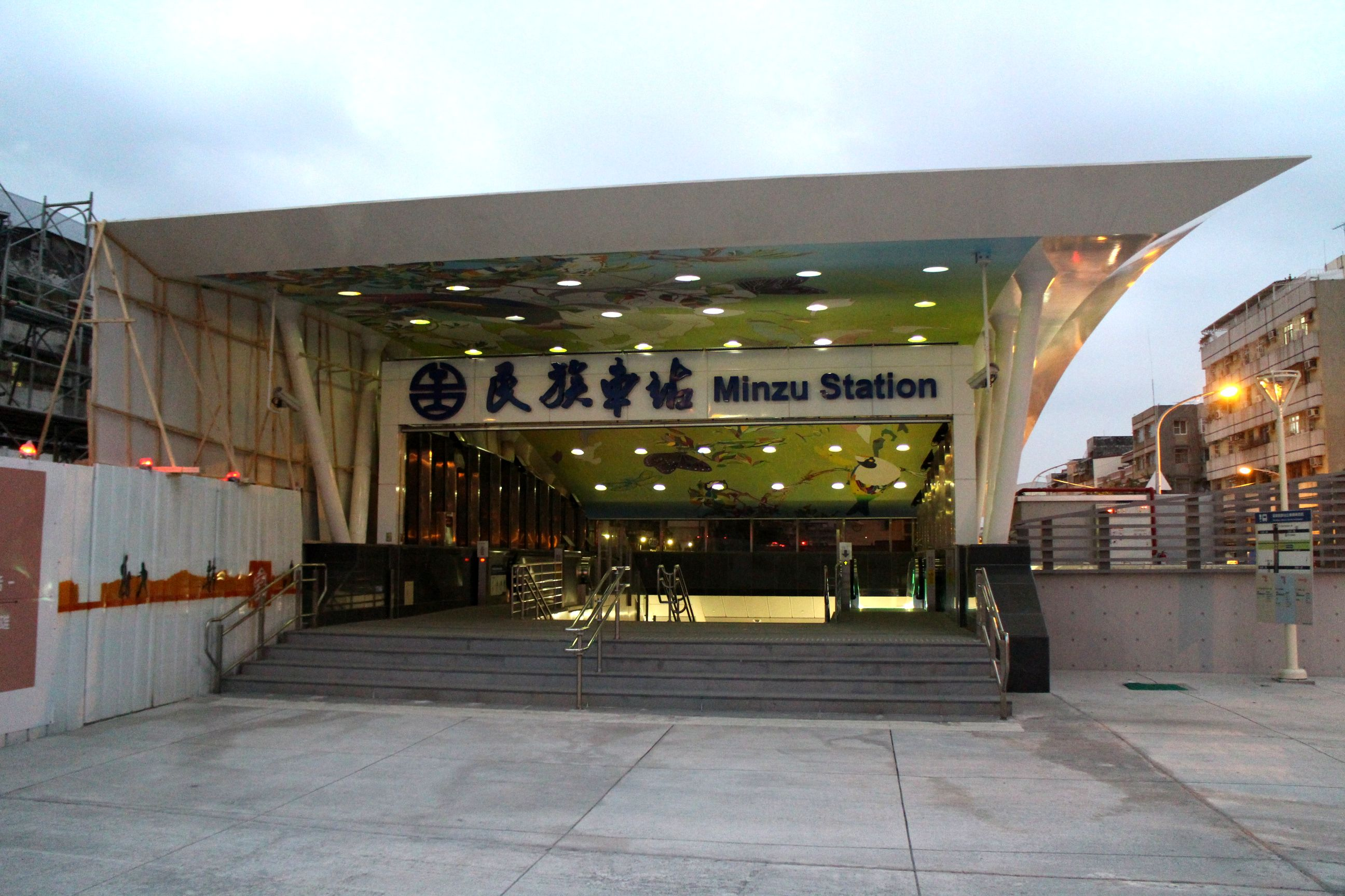 台湾鉄路管理局民族駅の地上出入口。